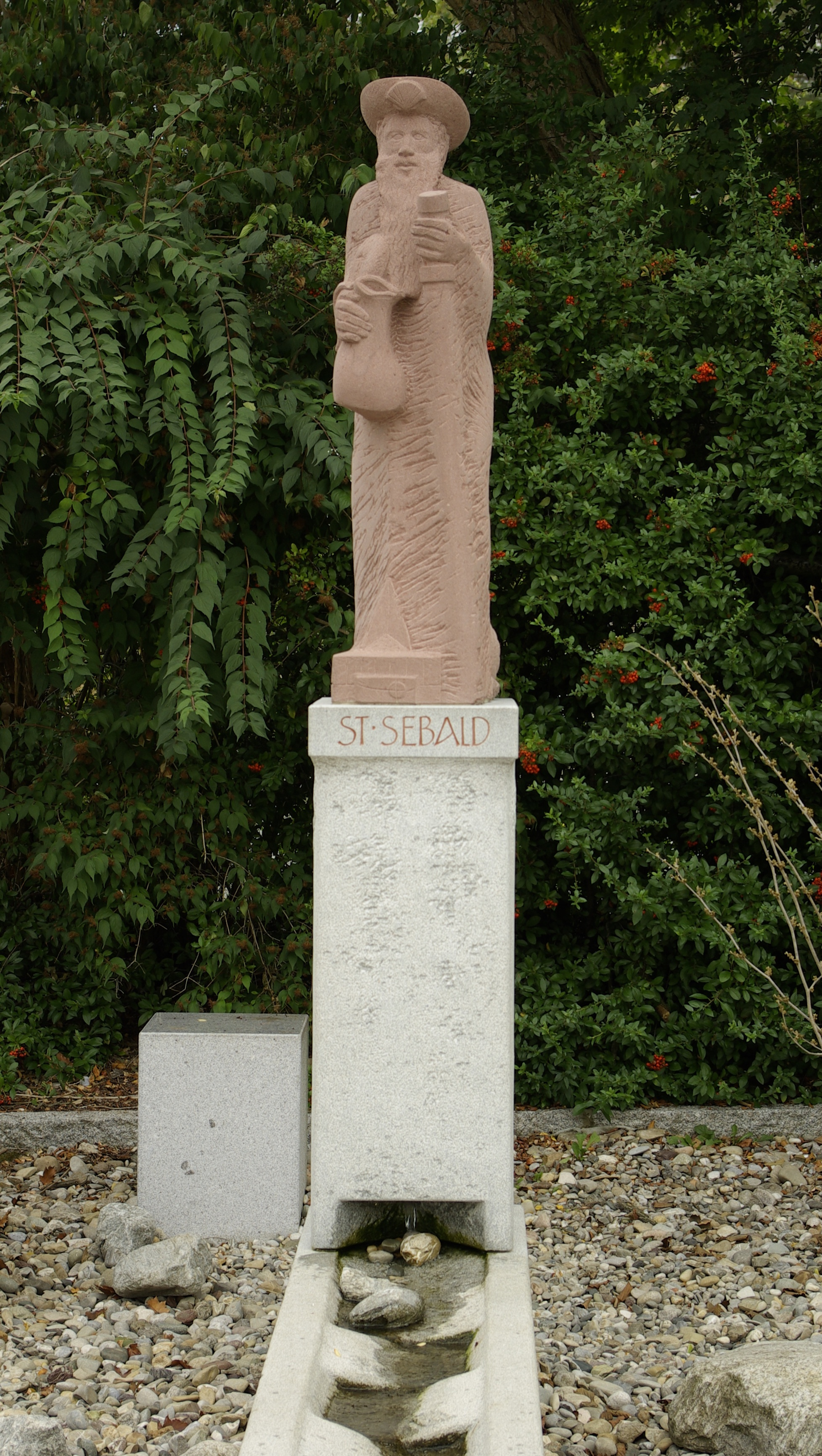 Brunnen vor der Pfarrkirche St. Sebald in Erlangen.